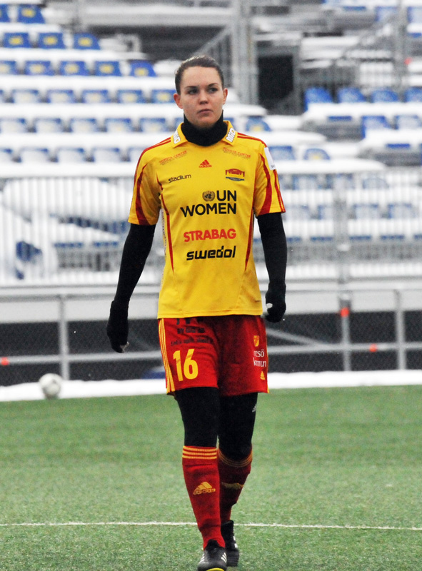 a_26_1346